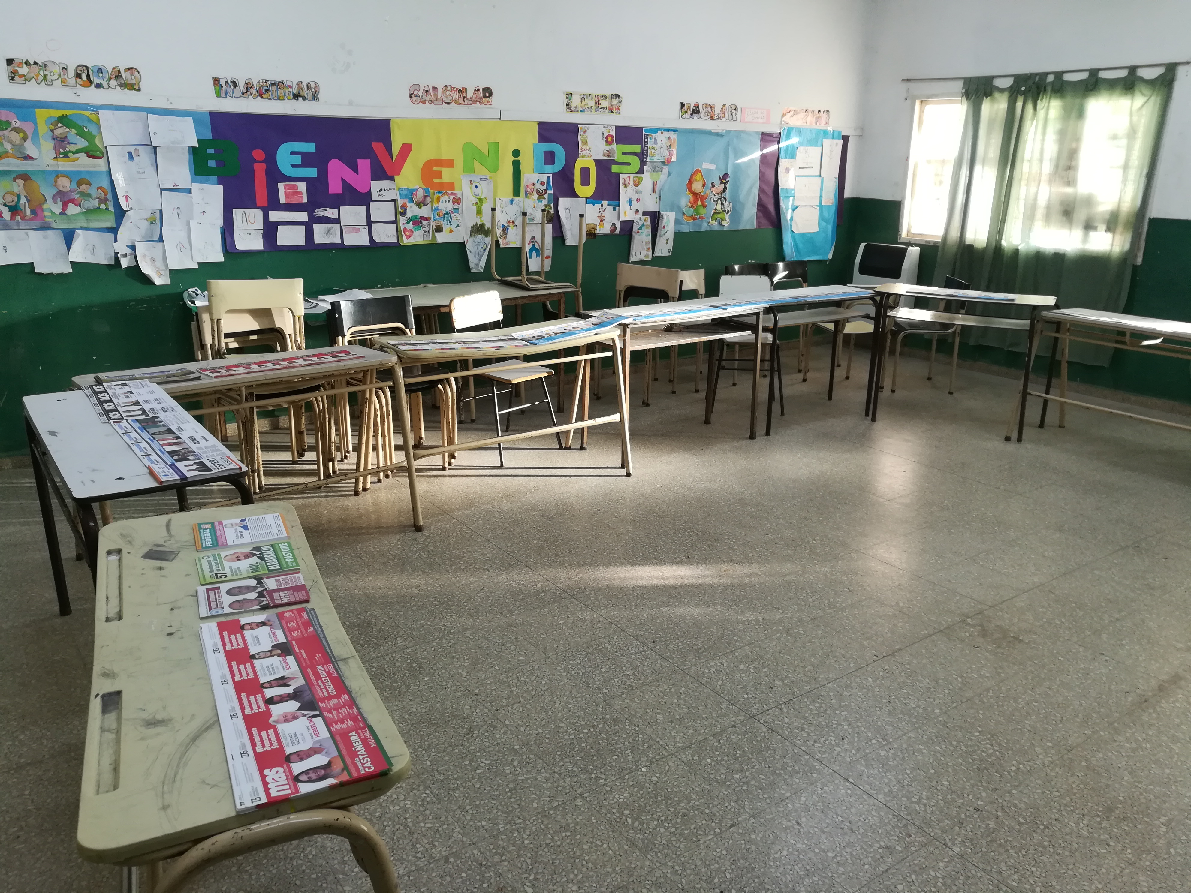 Cuarto oscuro de las elecciones primarias argentinas de 2019 en una escuela de Gonnet, Provincia de Buenos Aires.